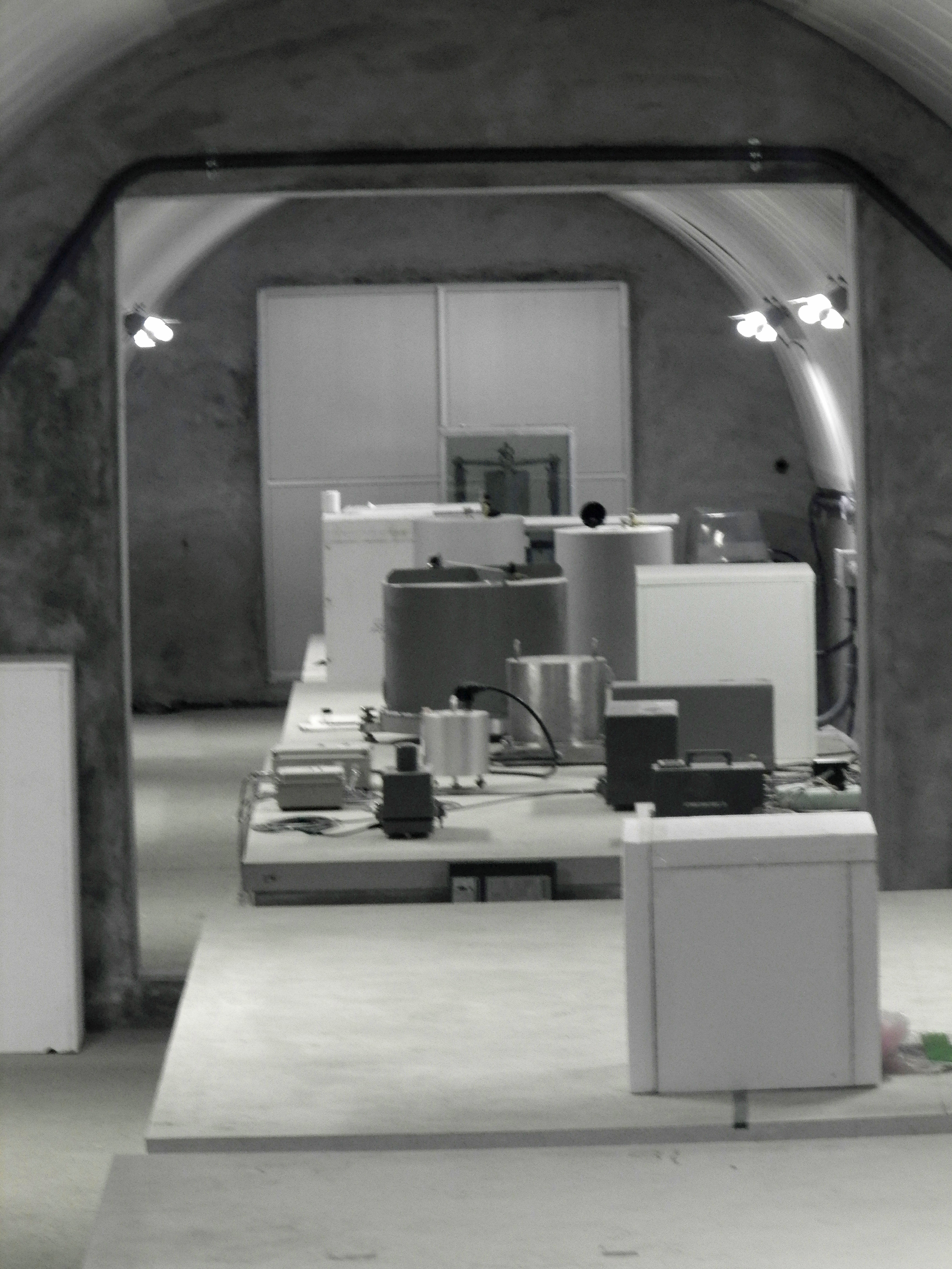 気象庁精密地震観測室の大坑道に設置されている地震計(STS1,STS2,etc)